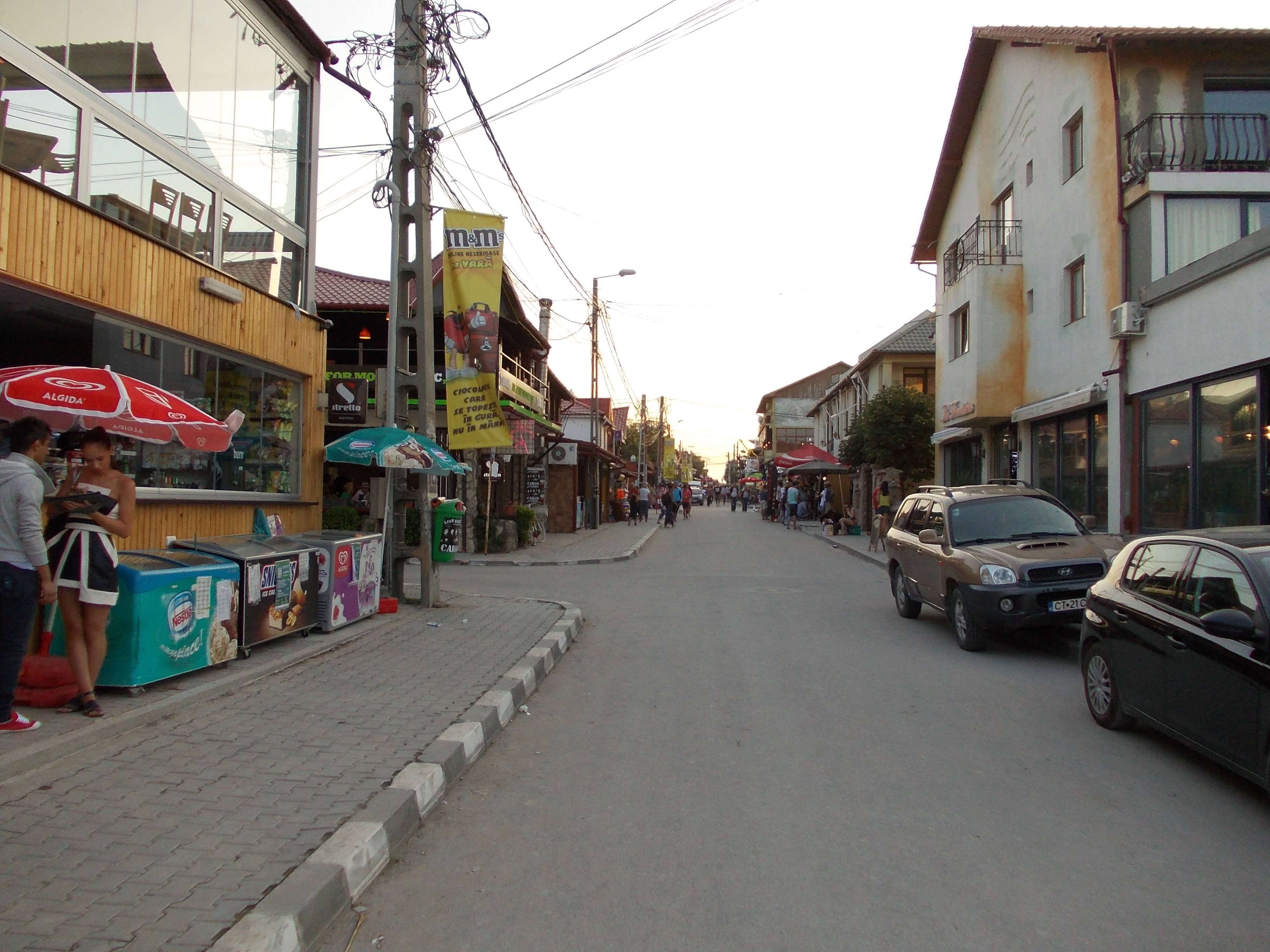 Stradă în Vama Veche